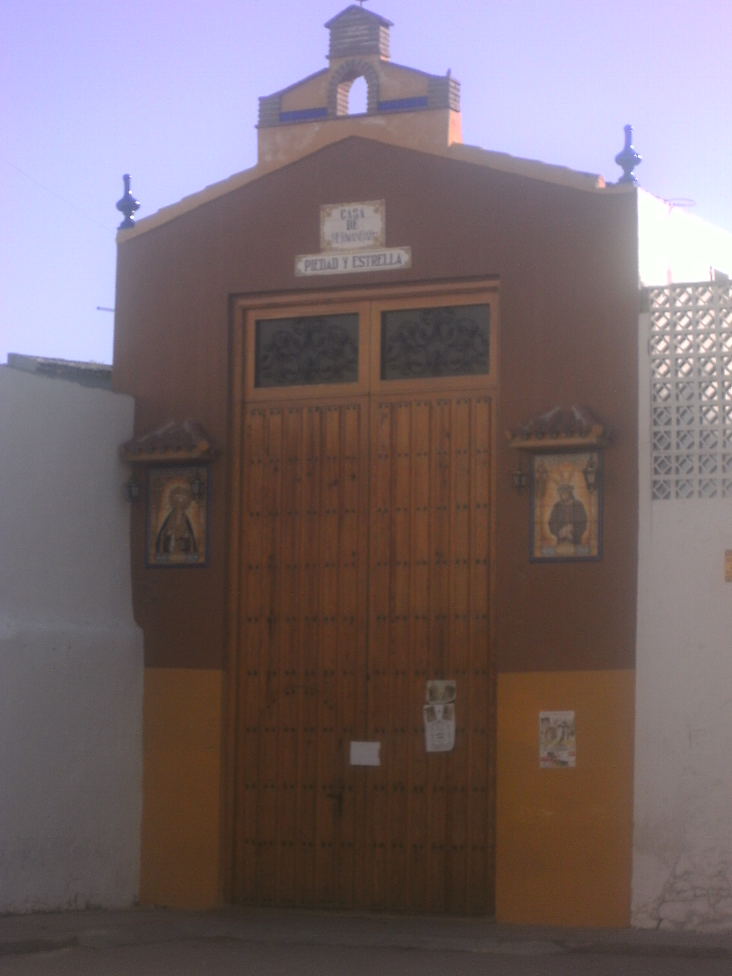 Puerta de la iglesia donde se haya la cofradía de Ntra. Señora de la Estrella del barrio de la Alcantarilla, Jaén